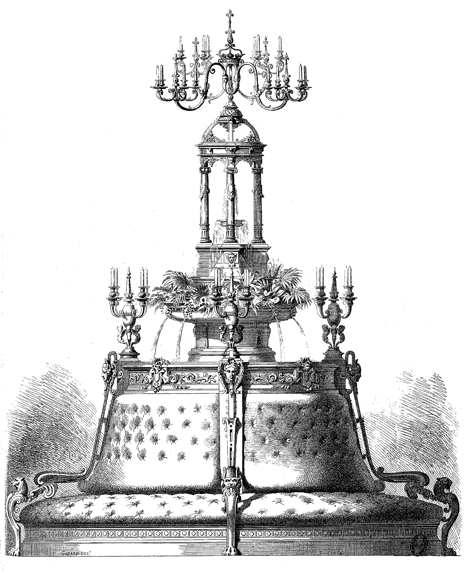 Pouf monumental fontaine-jardinière, exécuté par la maison Marchand et présenté à l'Exposition universelle de Vienne en 1873. Cet objet ornait le hall du casino d'Aix-les-bains dans le dernier quart du XIXe siècle.